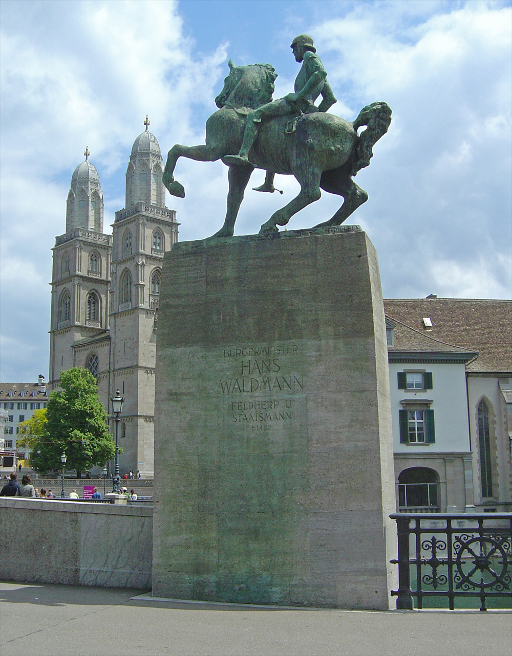 Statue des Bürgermeisters und Söldnerführers Hans Waldmann in Zürich